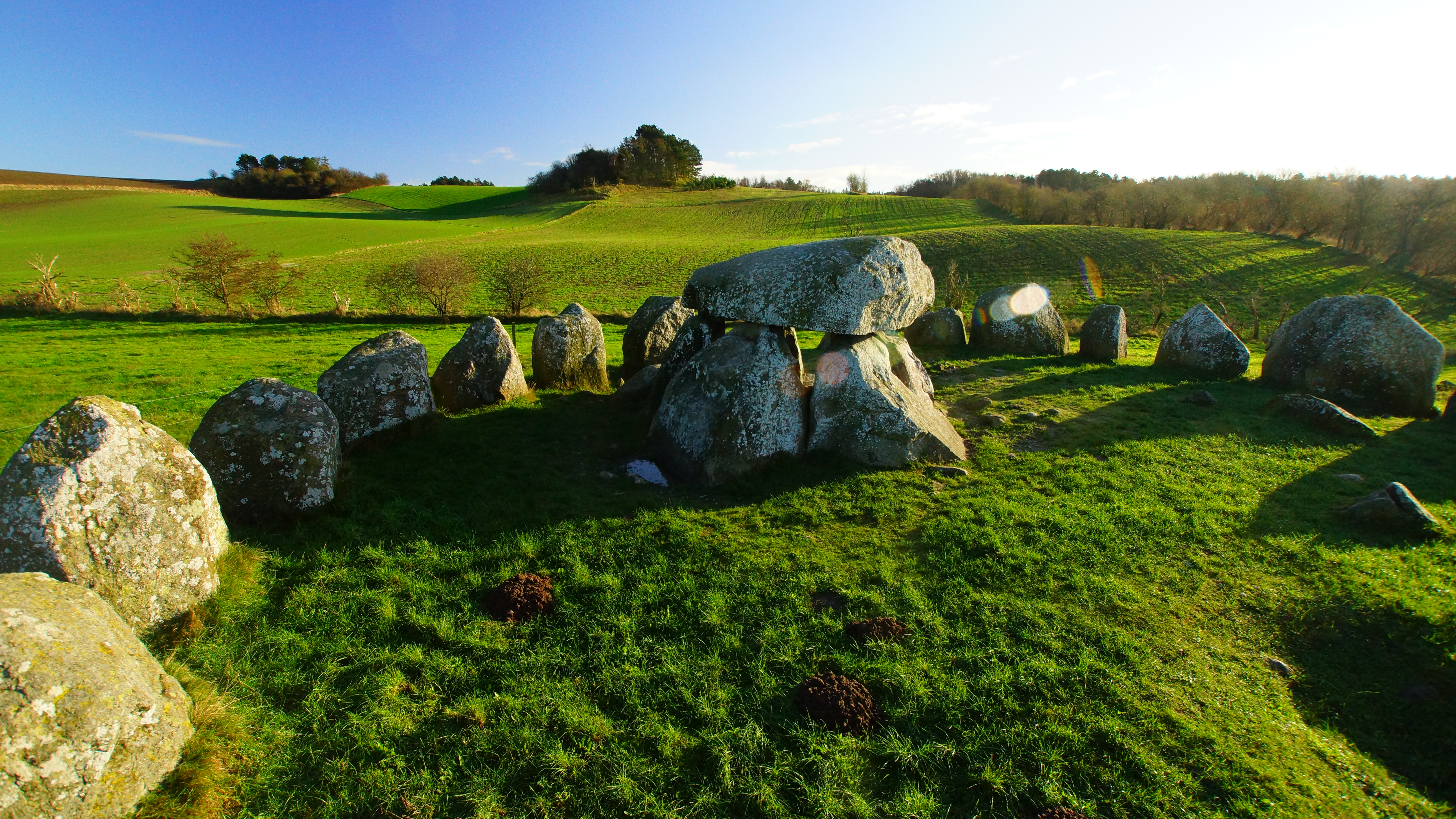 Poskær Stenhus 2